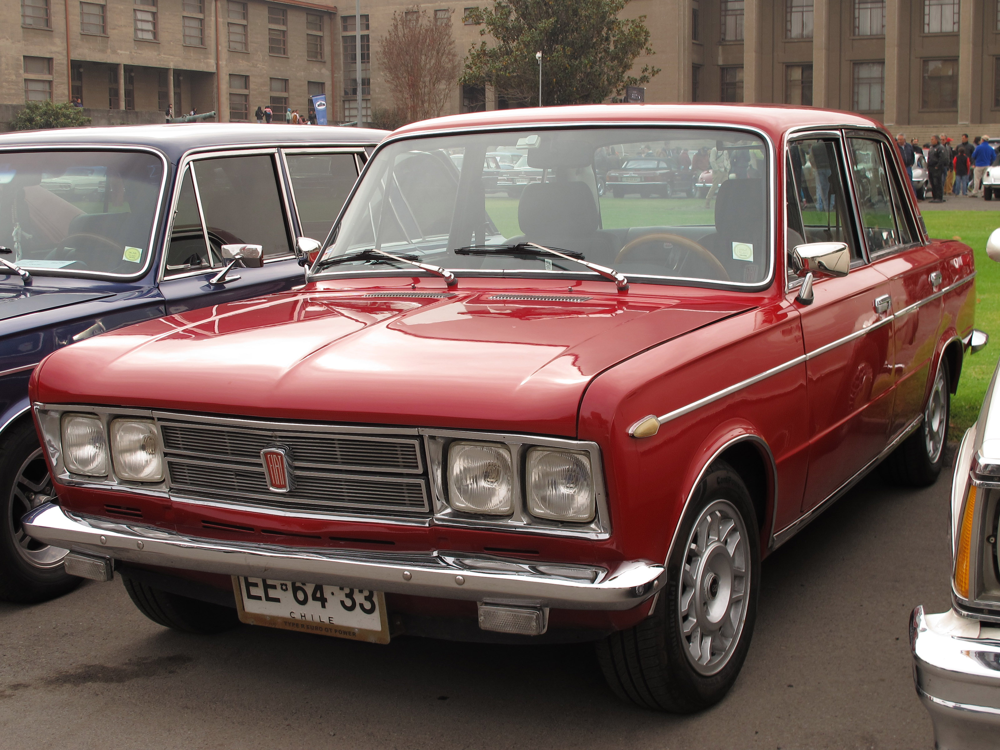 Fiat 125 Special 1971